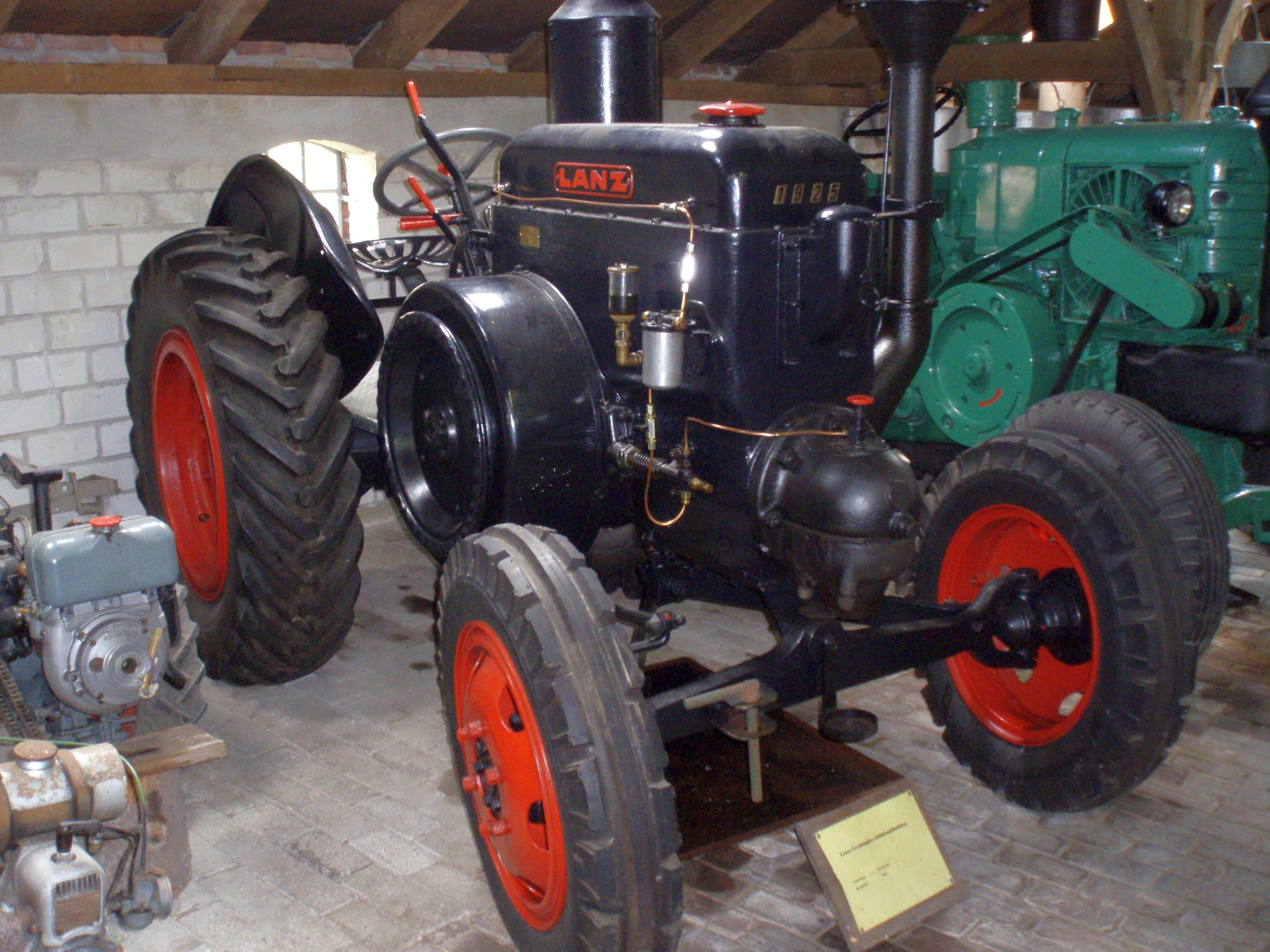 Lanz-Traktor. Das Foto wurde aufgenommen im Dorfmuseum Münkeboe